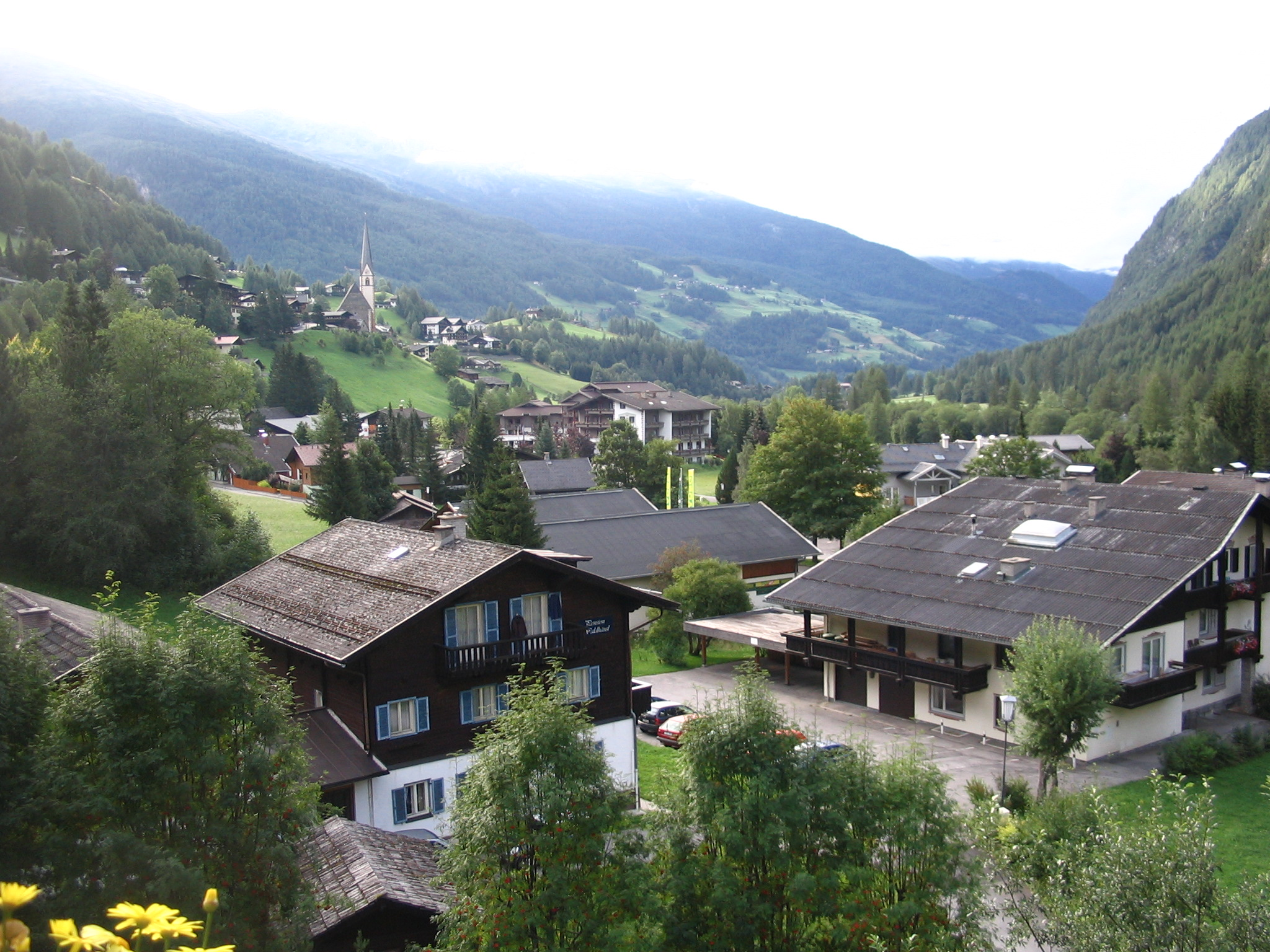 Heiligenblut mit Pfarrkirche